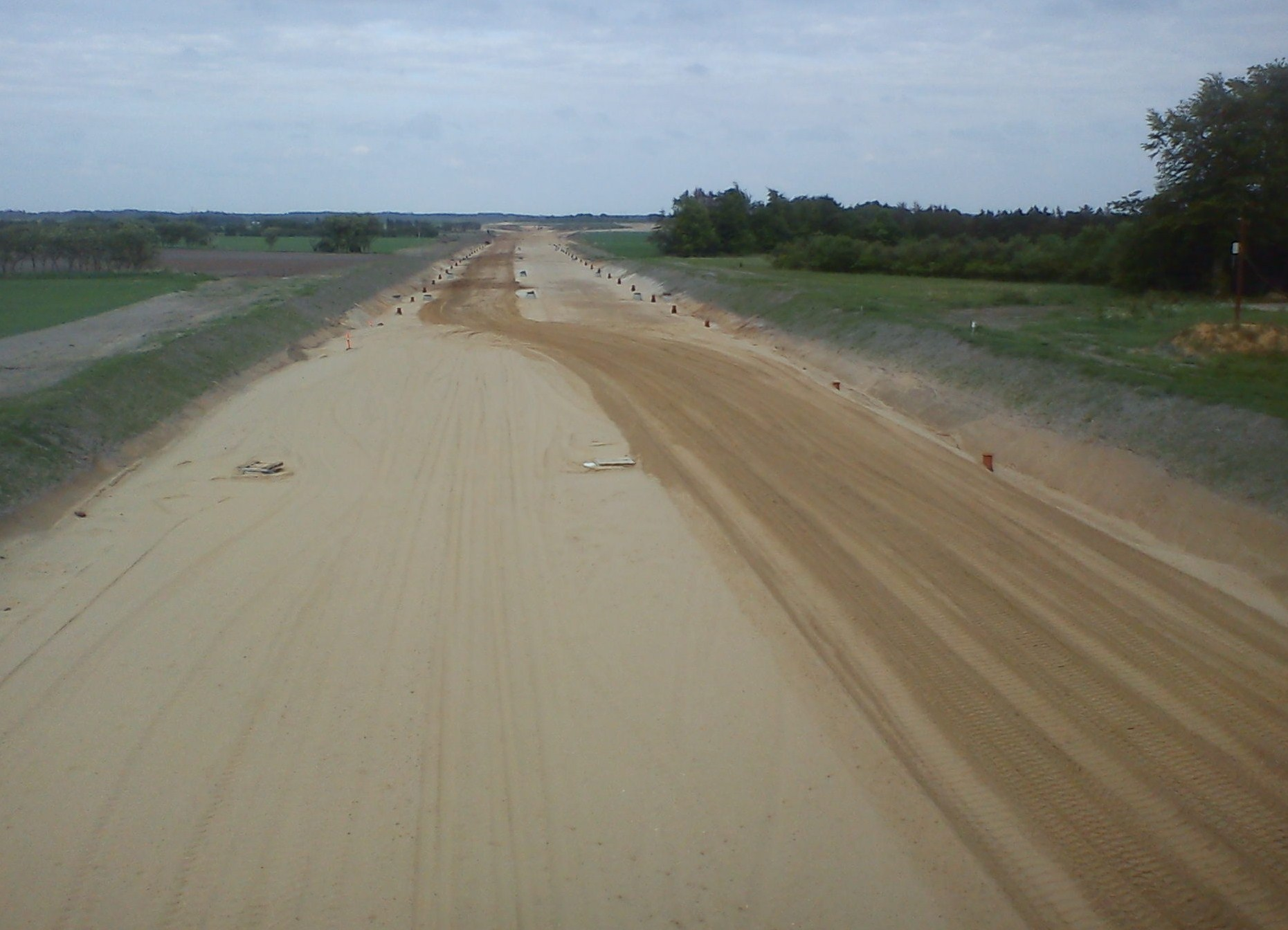 Herningmotorvejen 23/5 billed er tager mod øst, fra broen hvor Sigtenvej krydser motorvejen.